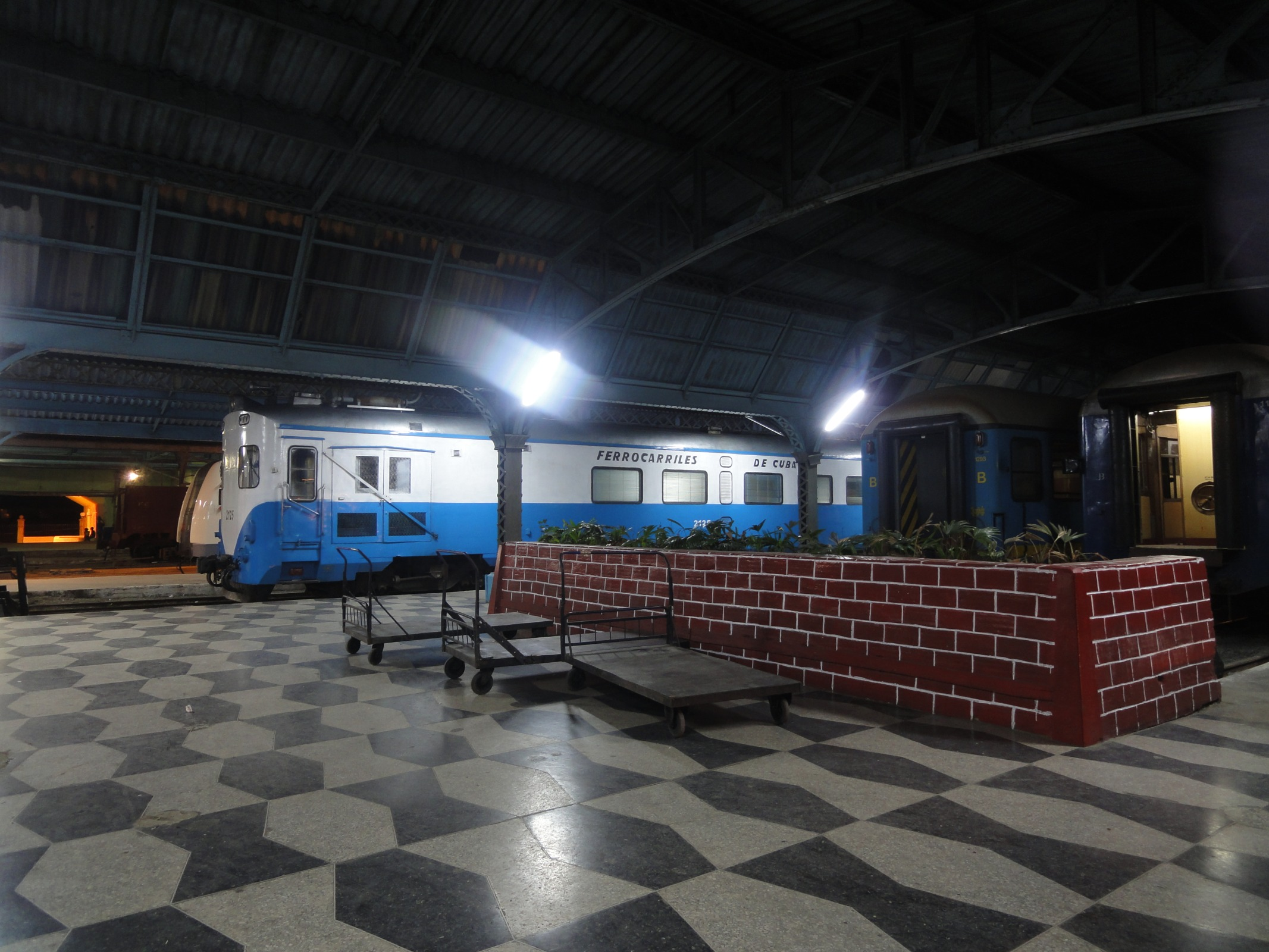 Estación Central de Ferrocarriles